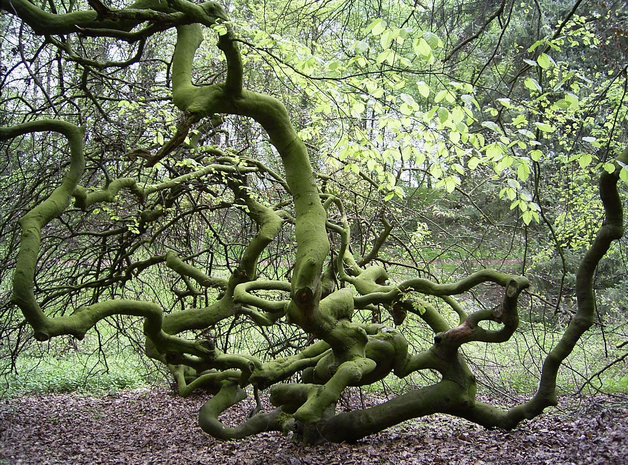 Süntelbuche, stammlose Buschform an der Cecilienhöhe im Kurpark von Bad Nenndorf